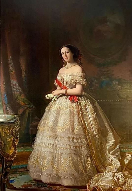 Francisca (182-1860) era hija de Cipriano Palafox y Portocarrero, conde de Teba y de Montijo, Grande de España, y de su esposa, María Manuela Kirkpatrick, de ascendencia escocesa. La hermana de María Francisca, Eugenia, se casó con el emperador de Francia. Francisca fue duquesa consorte de Alba como esposa de Jacobo Luis Fitz-James Stuart Ventimiglia Álvarez de Toledo Beaumont y Navarra, VIII. Duque de Berwick, VIII. Earl de Tinmouth, VIII. Barón Bosworth, VIII. Duque de Liria y Xérica, XV. Duque de Alba de Tormes (1821 -1881).